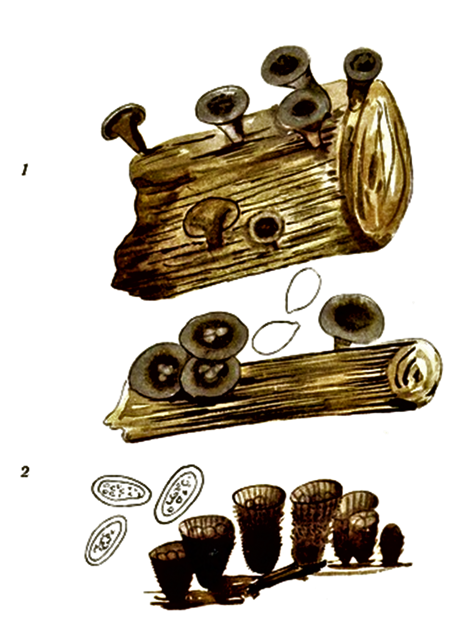 1. Cyathus vernicosus (Bull. , 1790) DC. (1805), heute Cyathus olla (Batsch, 1783) Pers. (1800) 2. Cyathus striatus (Huds., 1778) Willd. (1787)